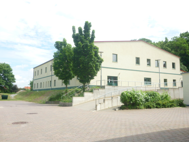 SpoLöd